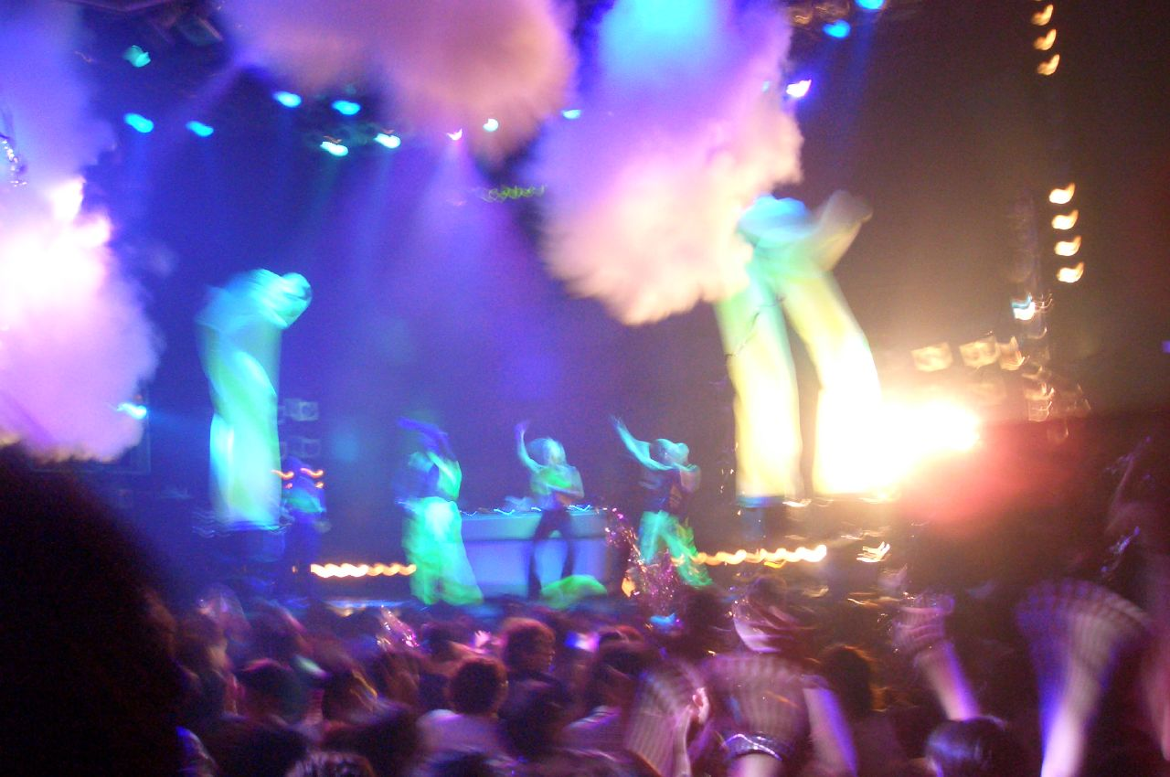 Velfarre, Aug 05